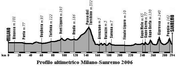 Profilo altimetrico Milano-Sanremo di ciclismo 2006